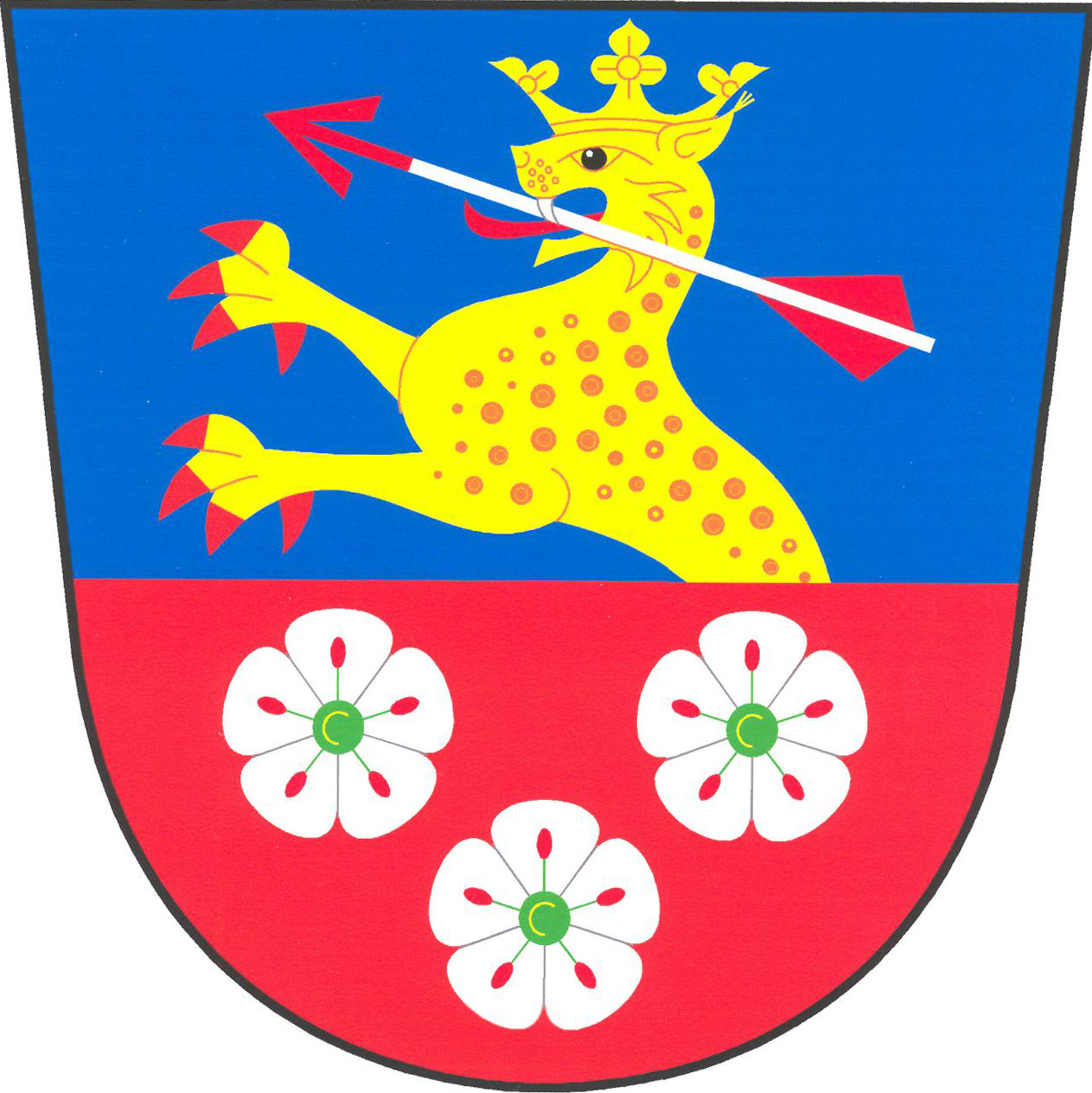 Znak obce Hlohová